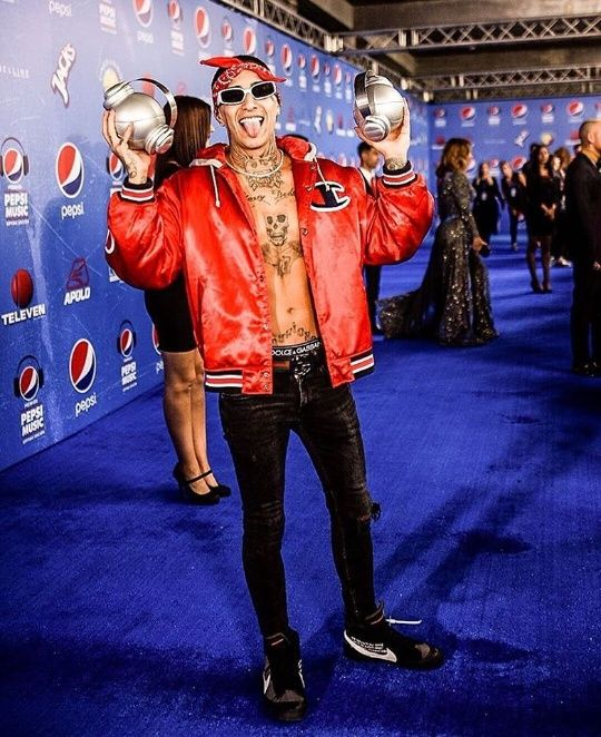 Neutro Shorty en los Premios Pepsi Music 2019 con sus premios de video trap del año (Bad Boy) y tema trap del año (Camino Solo)